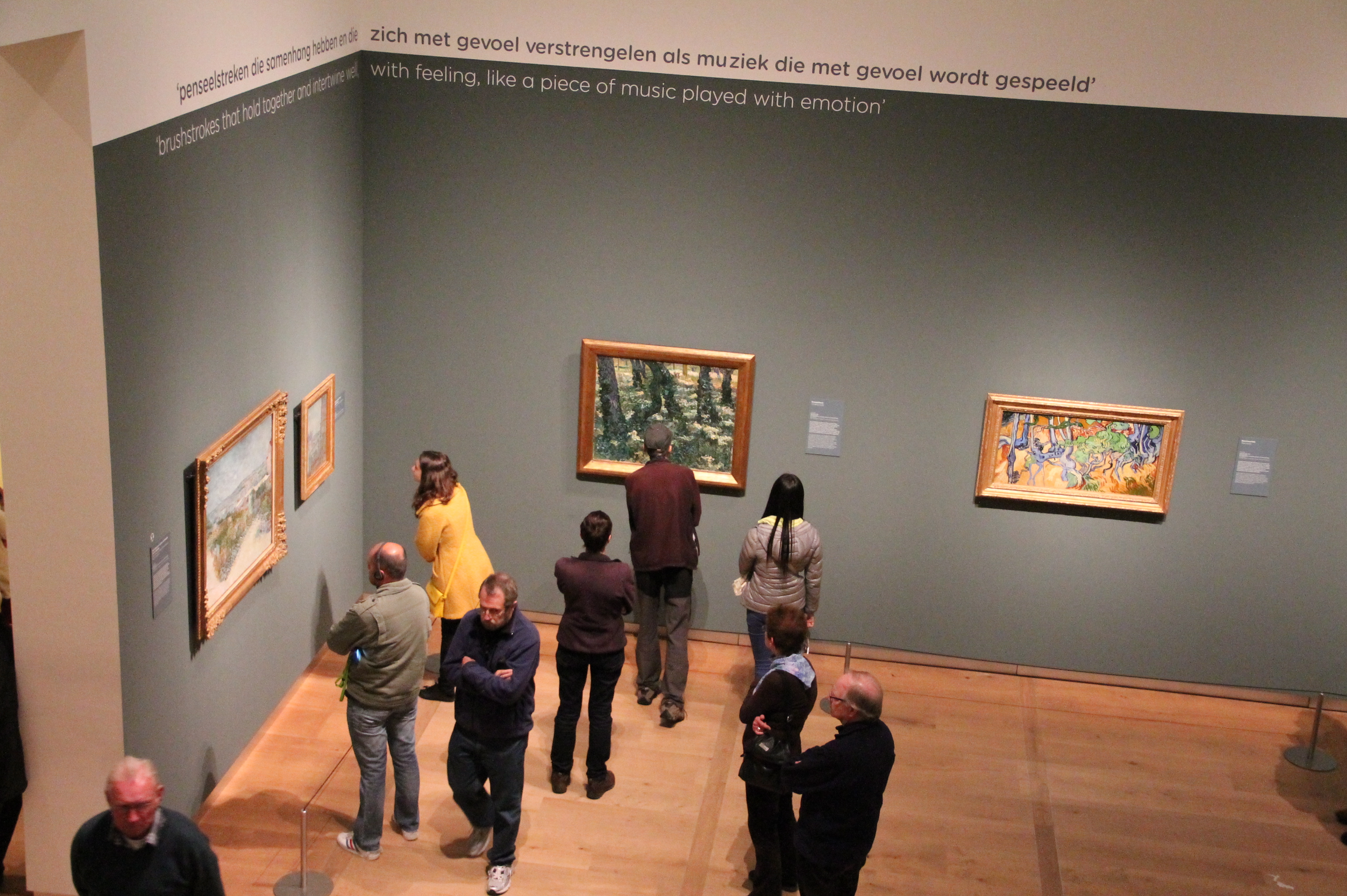 Ермітаж на Амстелі 2. Ермітаж на Амстелі експозиції